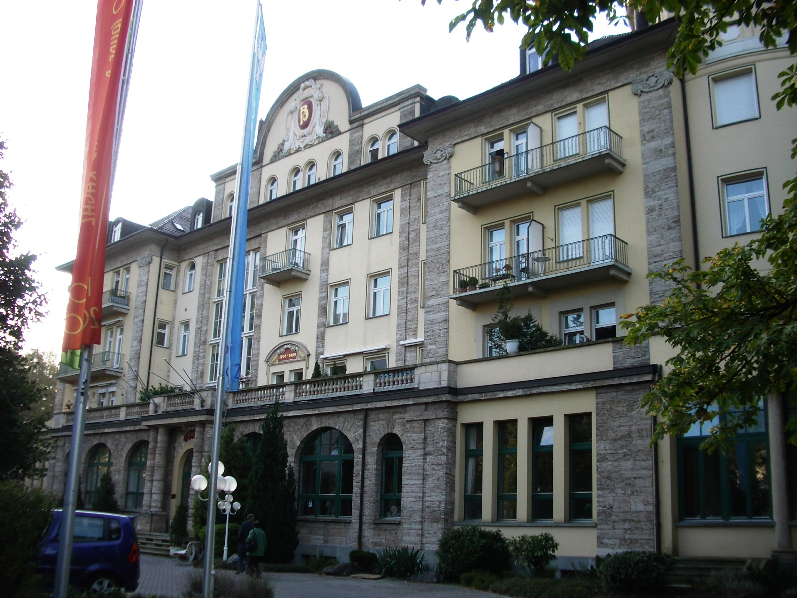 Bad Ragaz SG, Switzerland self-made, September 2006